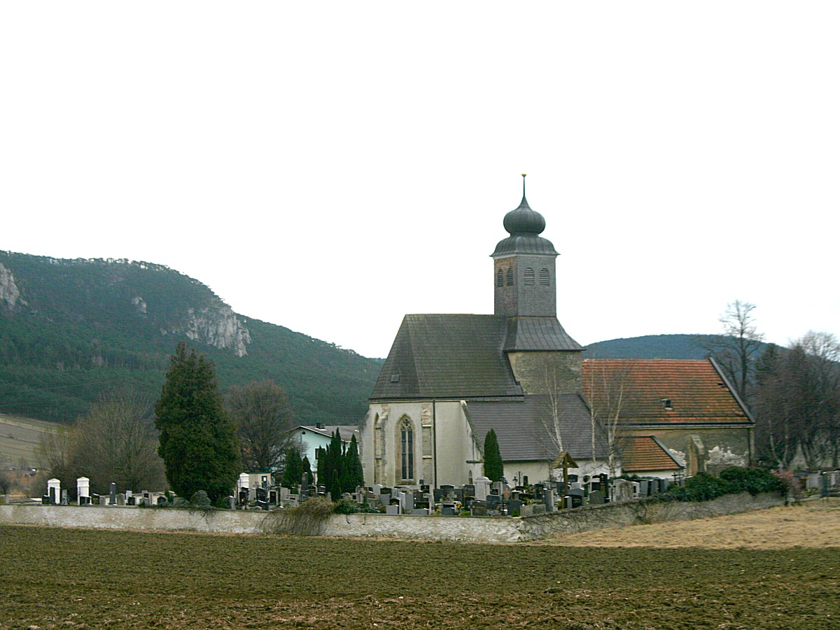 Muthmannsdorf Pfarrkirche Sankt Peter im Moos (Bild 1)